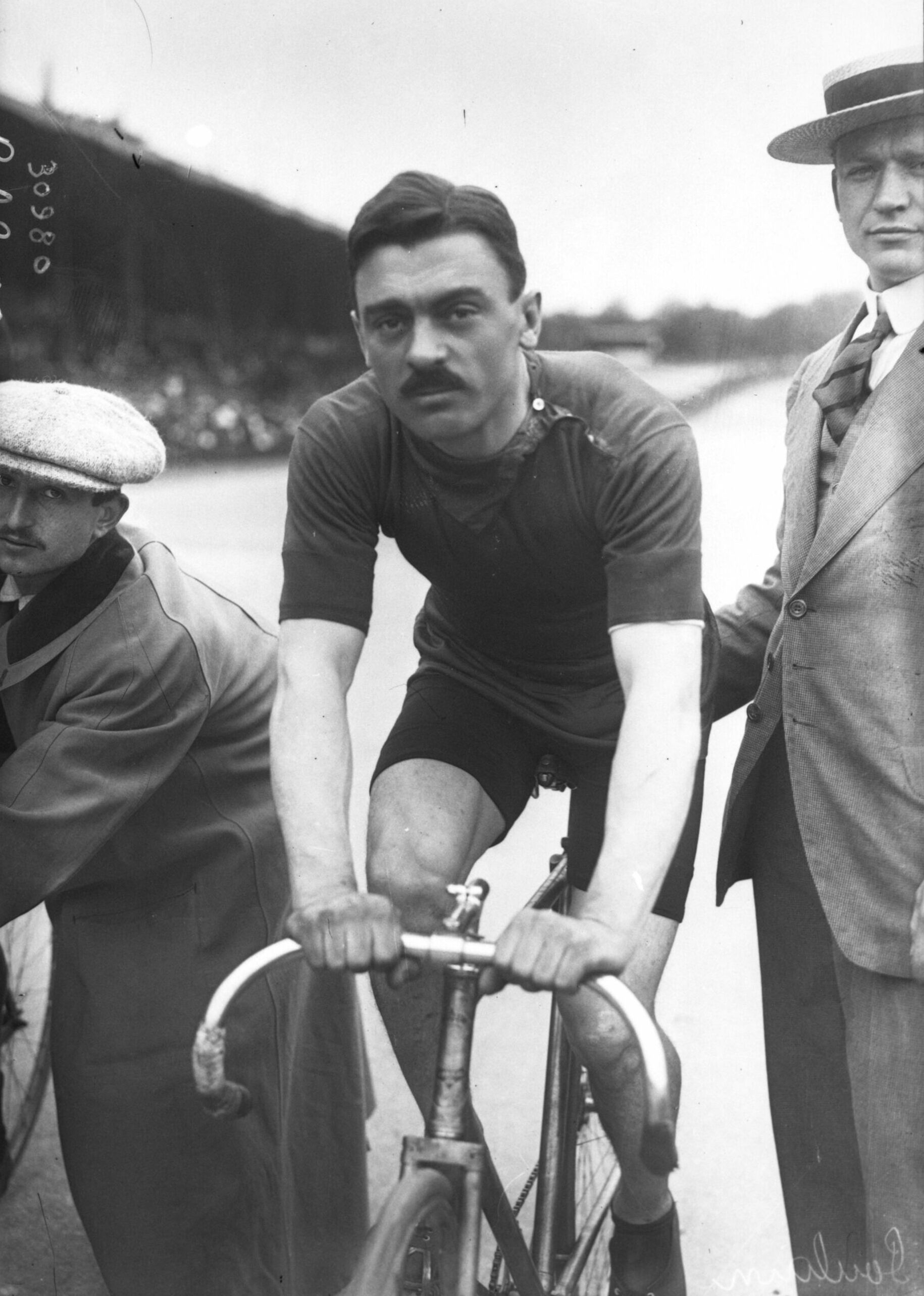 Gabriel Poulain portrait du coureur cycliste avant le départ